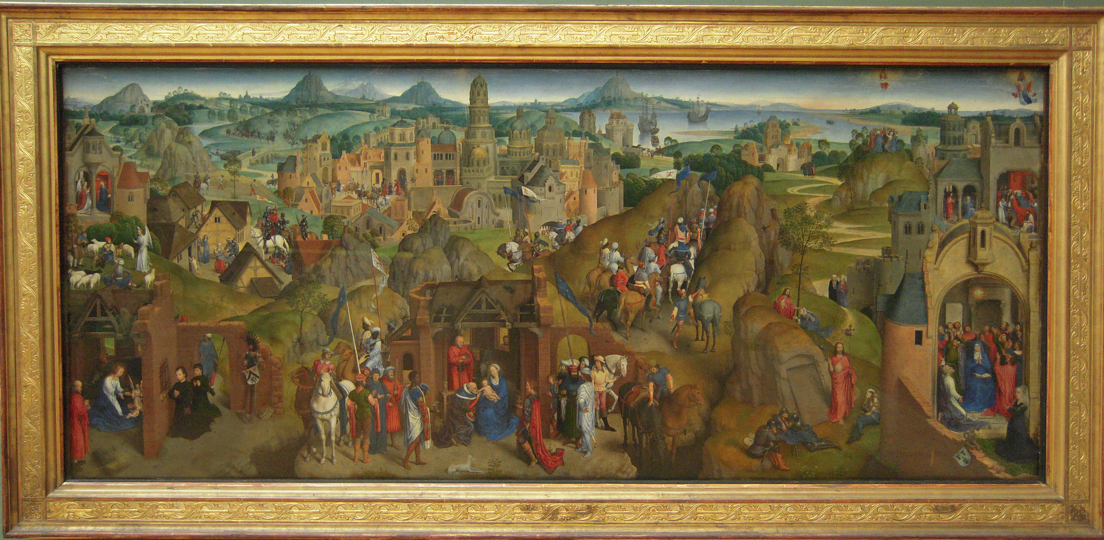 Das Gemälde wurde 1480 für die Kapelle der Lohgerbergilde in der Frauenkirche zu Brügge gestiftet. Der Stifter Pieter Bultync ist links im Bild mit seinen Söhnen dargestellt, seine Frau Katharina van Riebeke rechts.